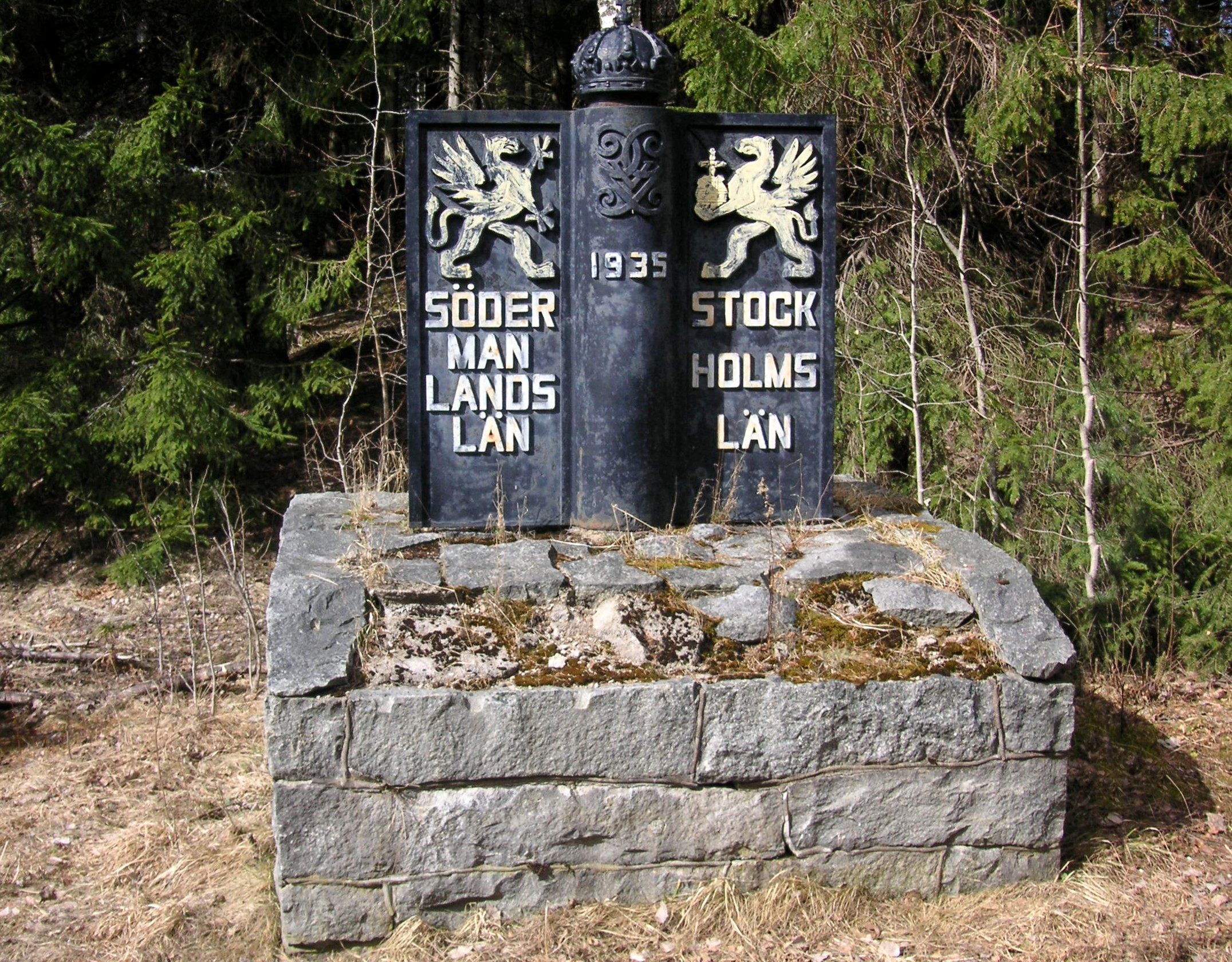 Gränsmarkering mellan Södermanslands län och Stockholmslän